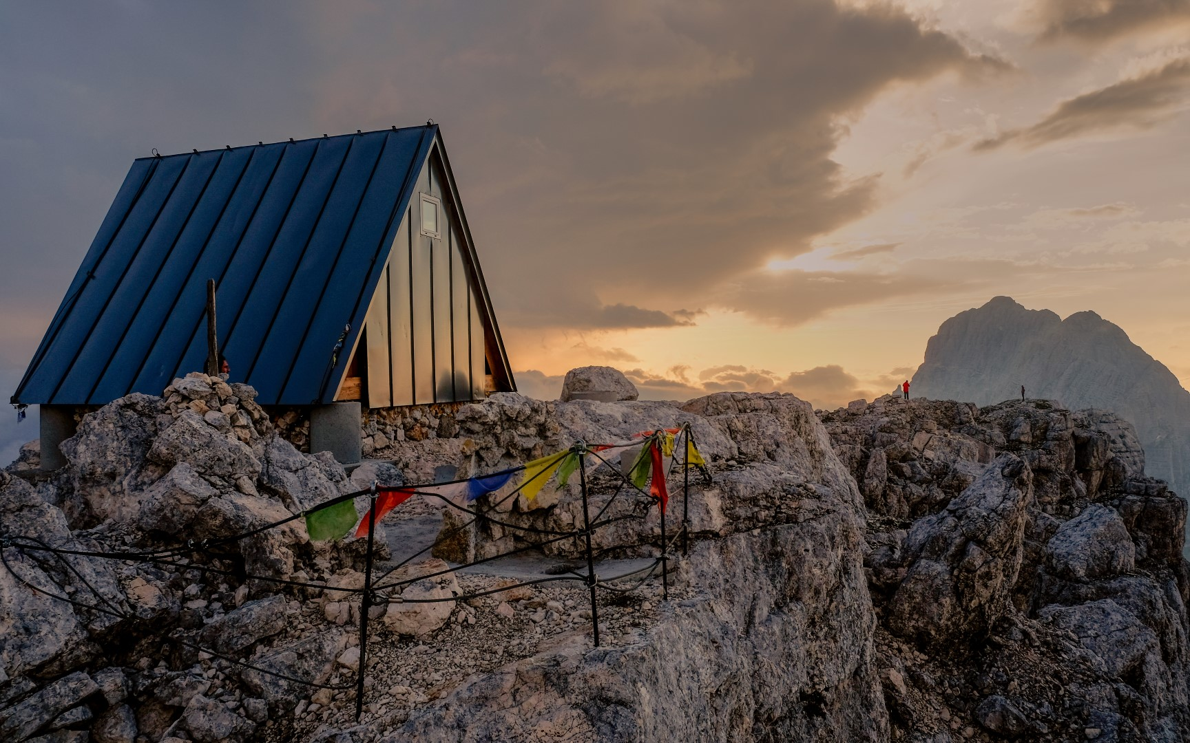 Alpi Giulie (Q47510436)